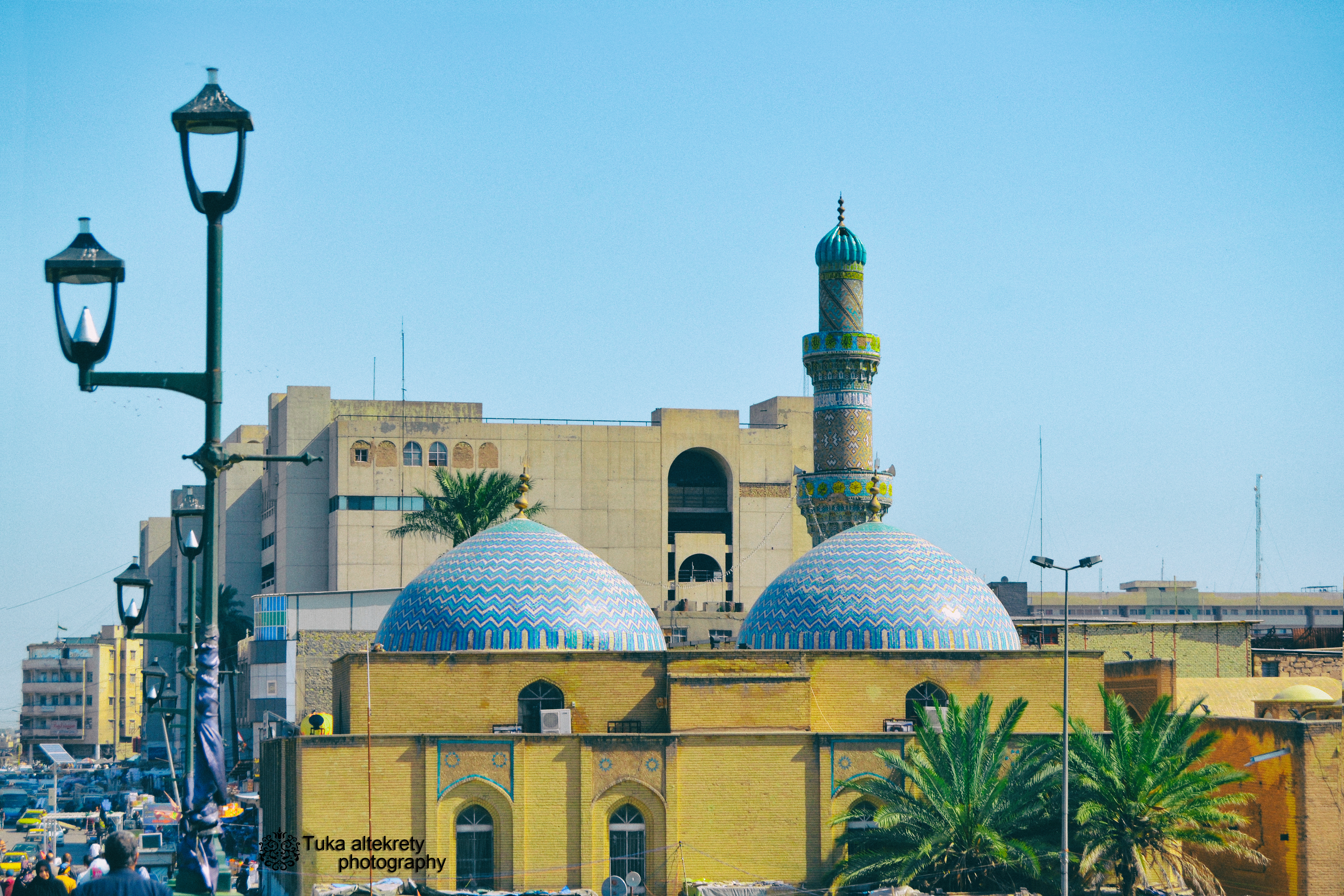 جامع الآصفية من المساجد الأثرية القديمة في بغداد ويقع قرب رأس الجسر القديم المطل على نهر دجلة، وكان يسمى بجامع المولى خانة أو تكية المولى خانة وداخل هذا الجامع قبر عن شمال الداخل في الرواق في سرب من الأرض عقدت عليه قبة موازية لأرض المسجد في غاية من الأتقان والرصانة